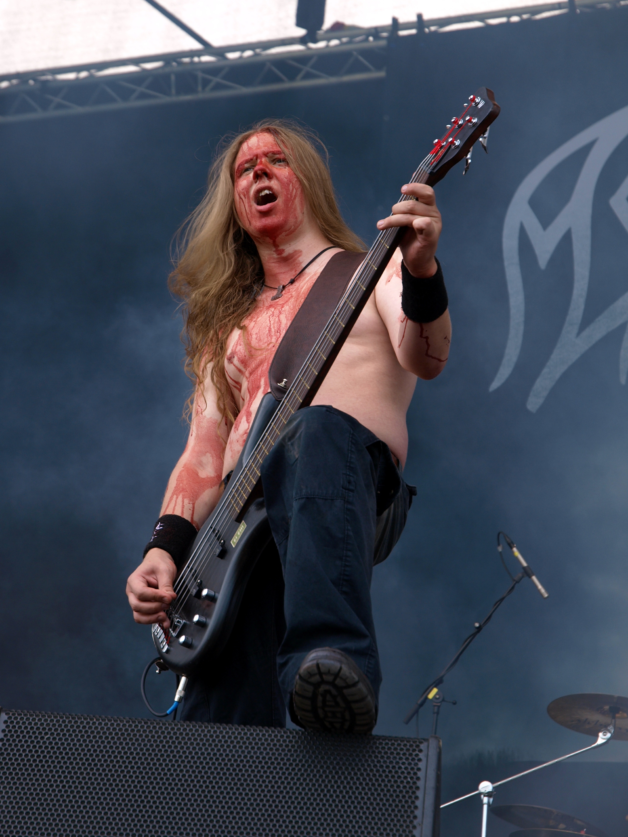 Moonsorrow live am Myötätuulirock 2011